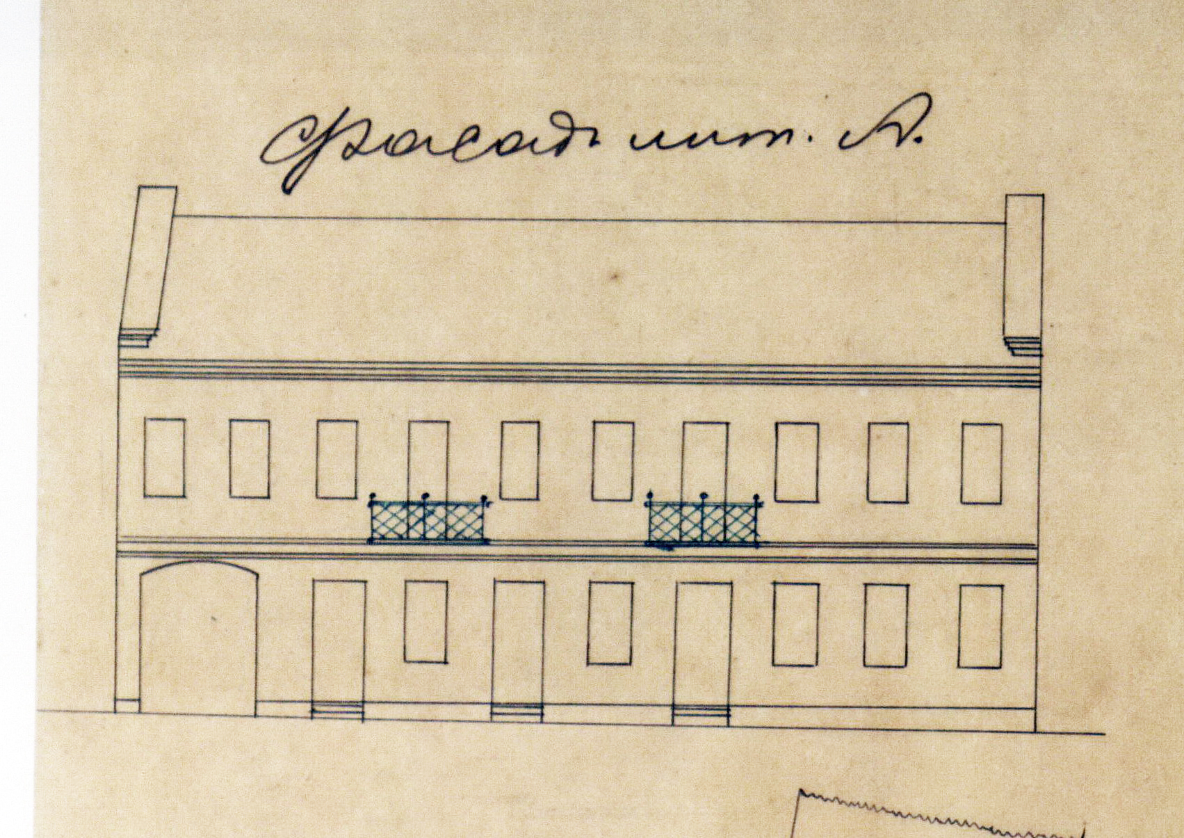 Беларуская (тарашкевіца): Менск (Miensk), вуліца Койданаўская (vulica Kojdanaŭskaja). Дом Фрыдмана (Frydman)